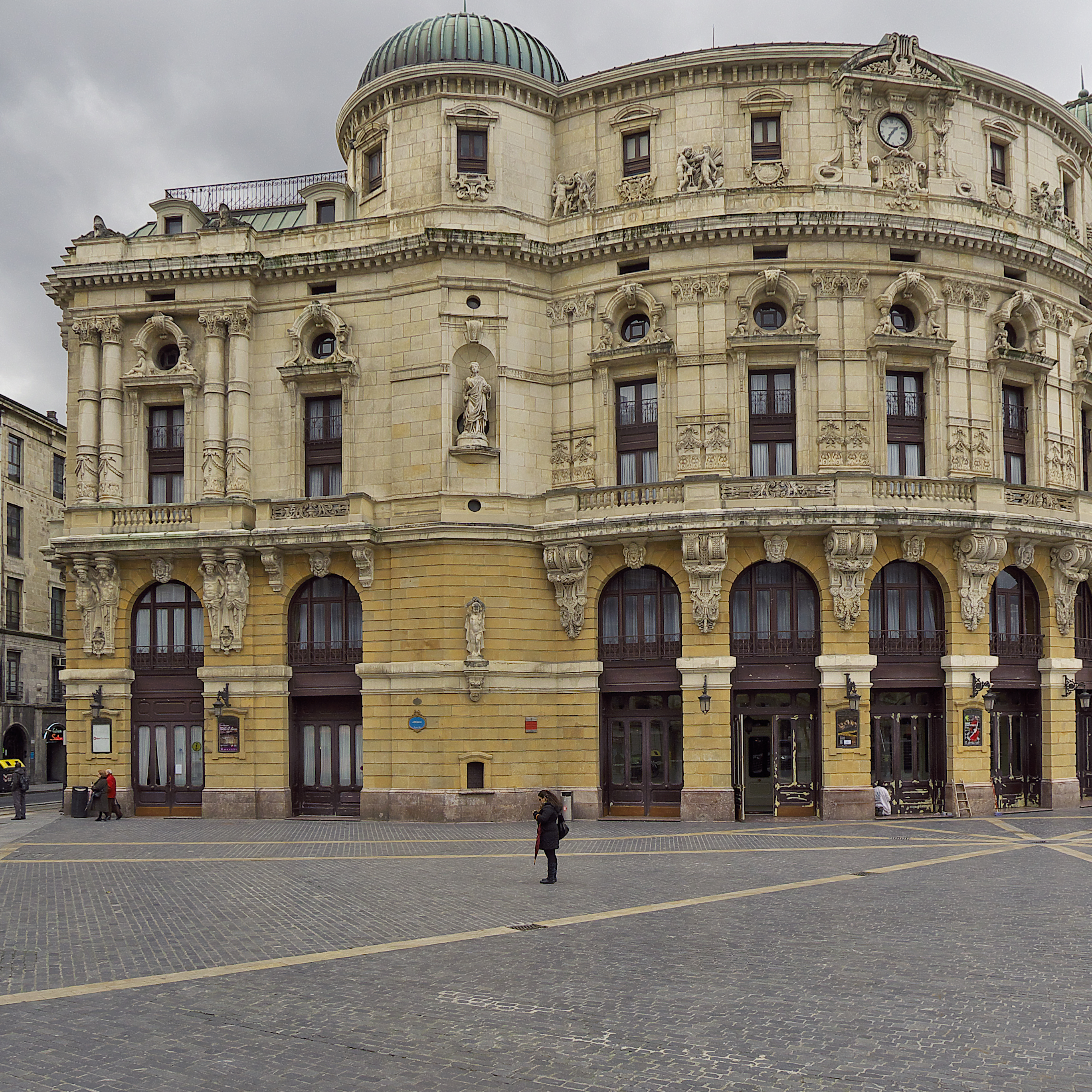 El cántabro Joaquín Rucoba inagura el soberbio edificio en el año 1890